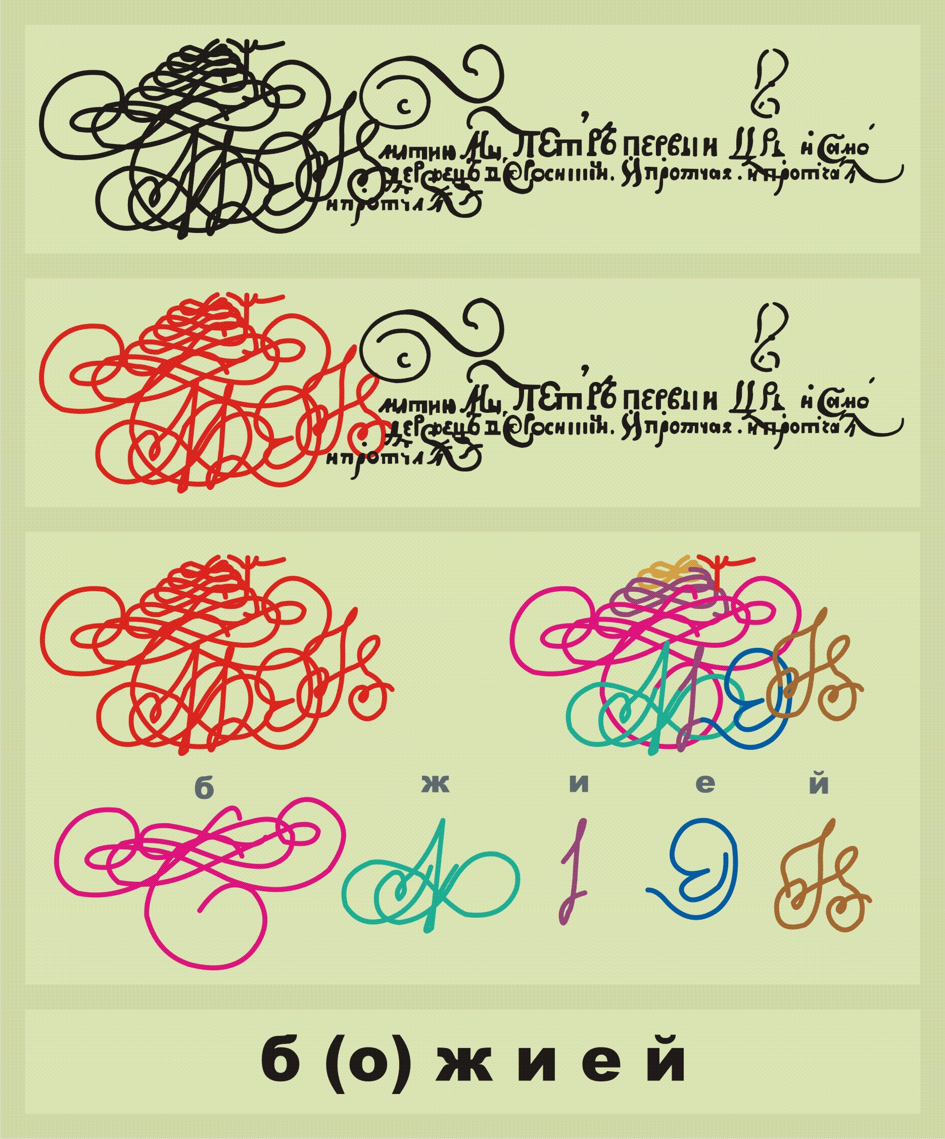 Монокондил в титулатуре Петра I